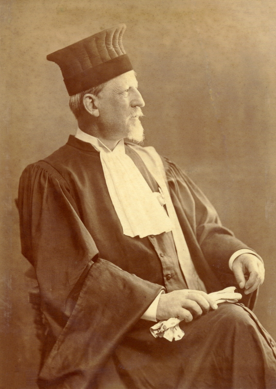 Théophile Cart, Cambridge 1907. Porträt anlässlich des 3. Esperanto-Weltkongresses